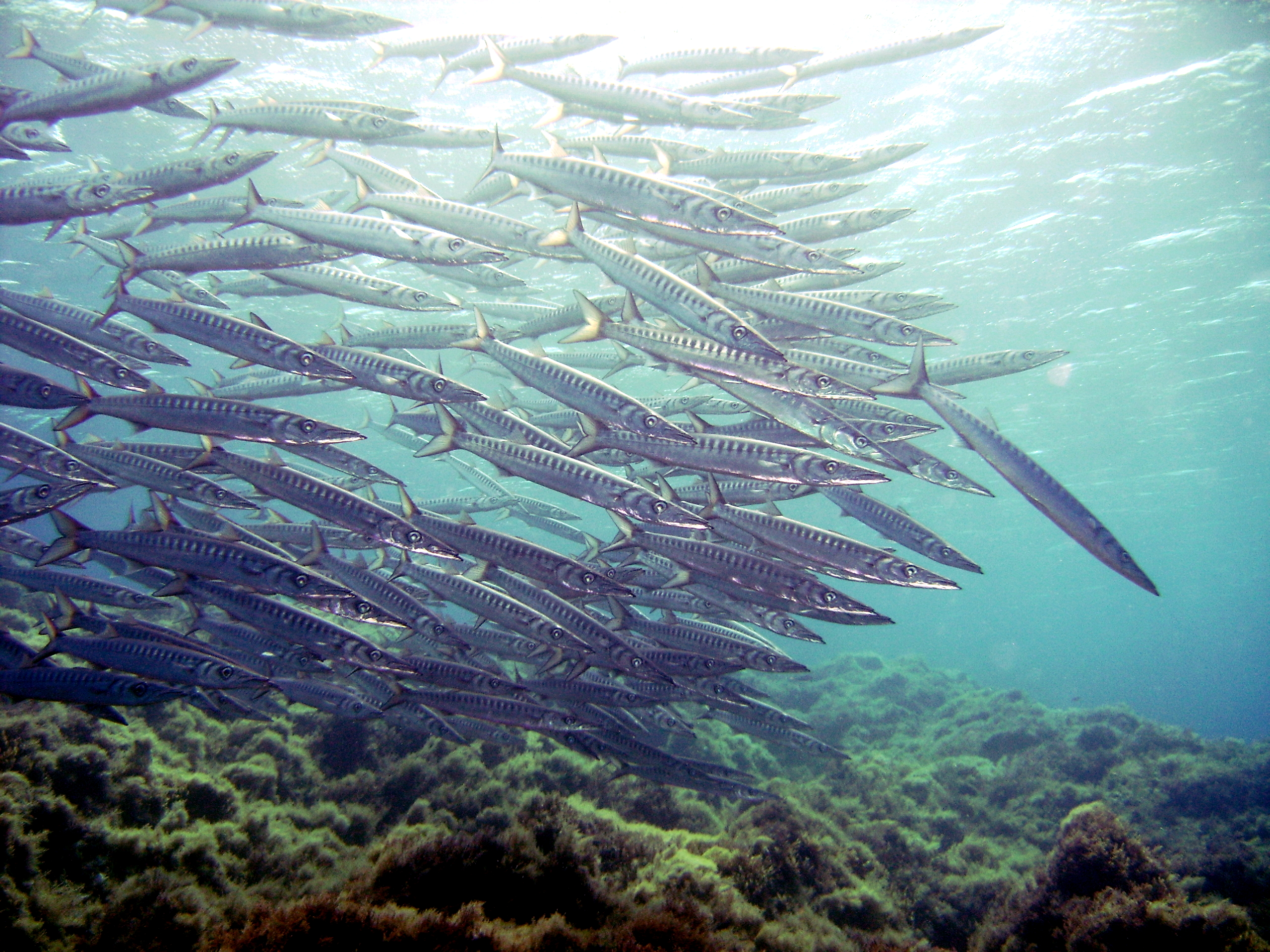 Baracudas Gozo